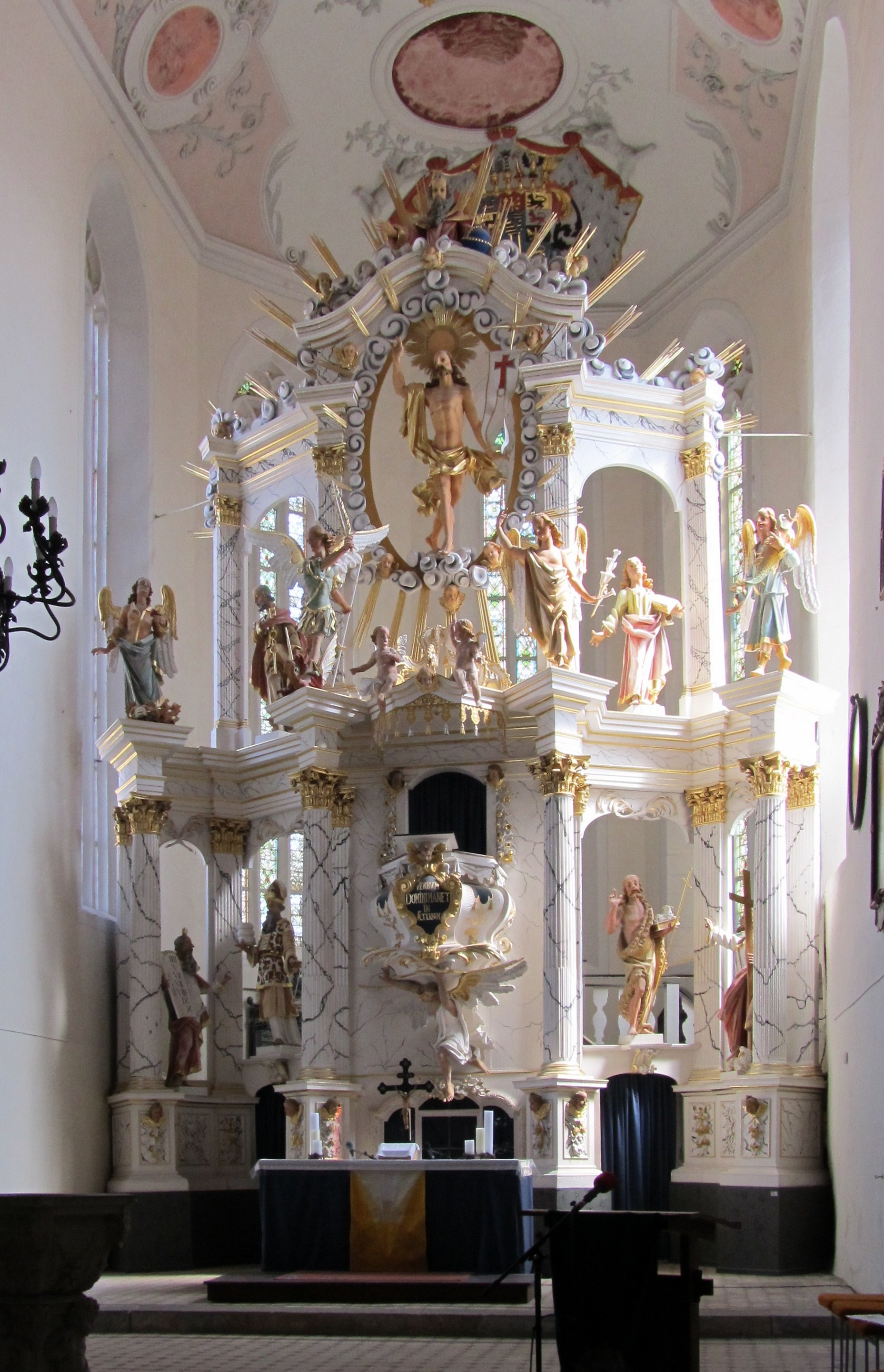 Der Altarraum der Stadtkirche von Buttstädt (Thüringen).